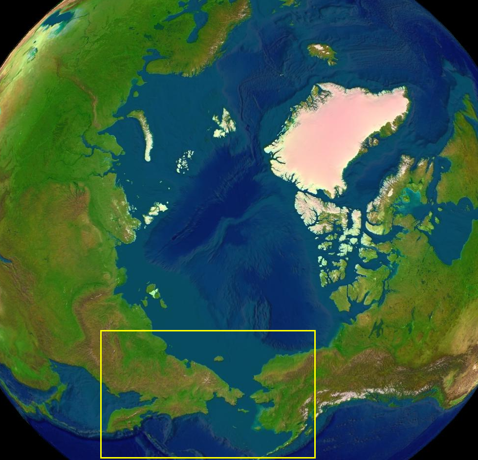 Beringia at Arctica surface